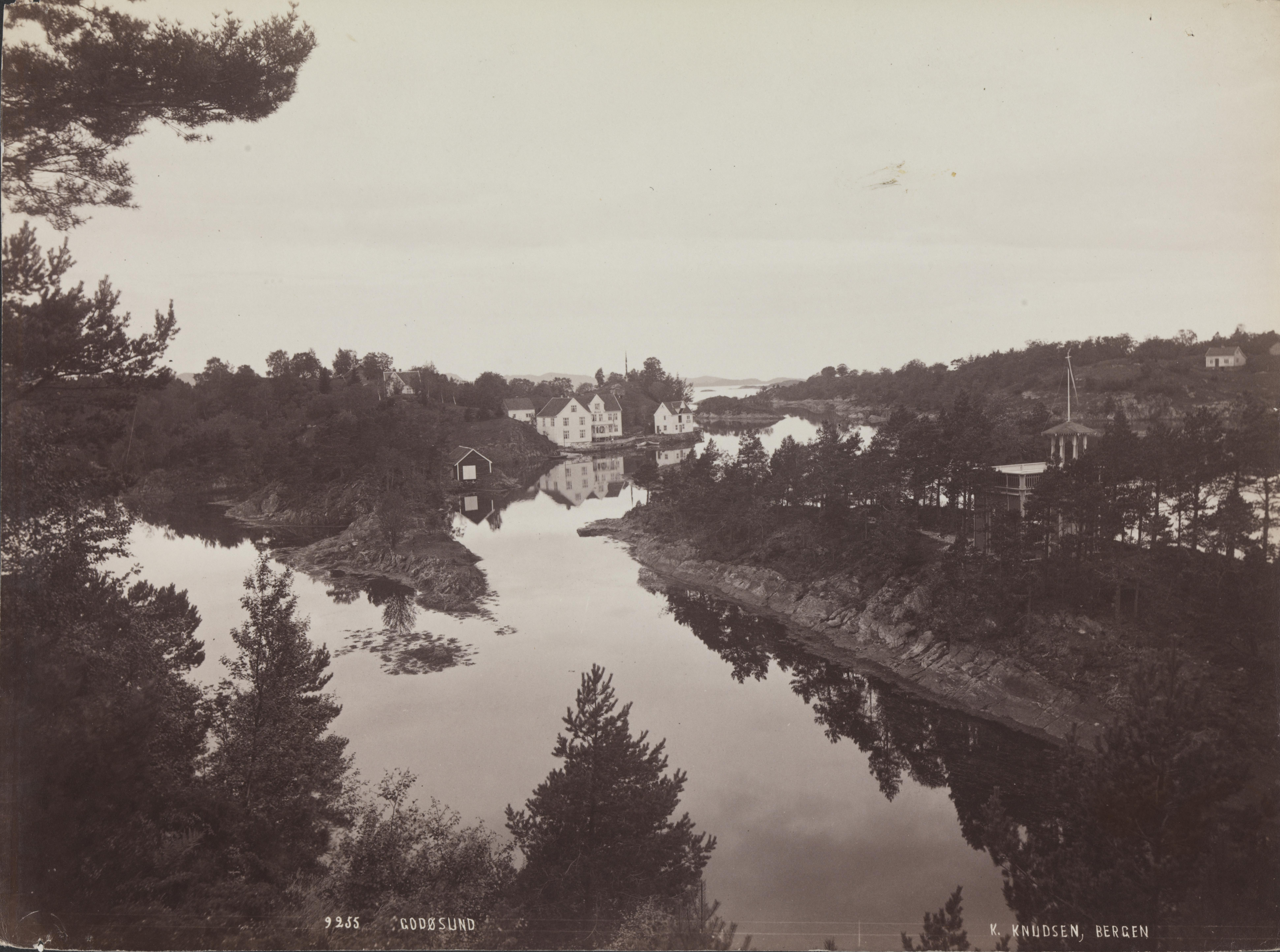 Bildet er hentet fra Nasjonalbibliotekets bildesamling Godøysund, Tysnes, Hordaland